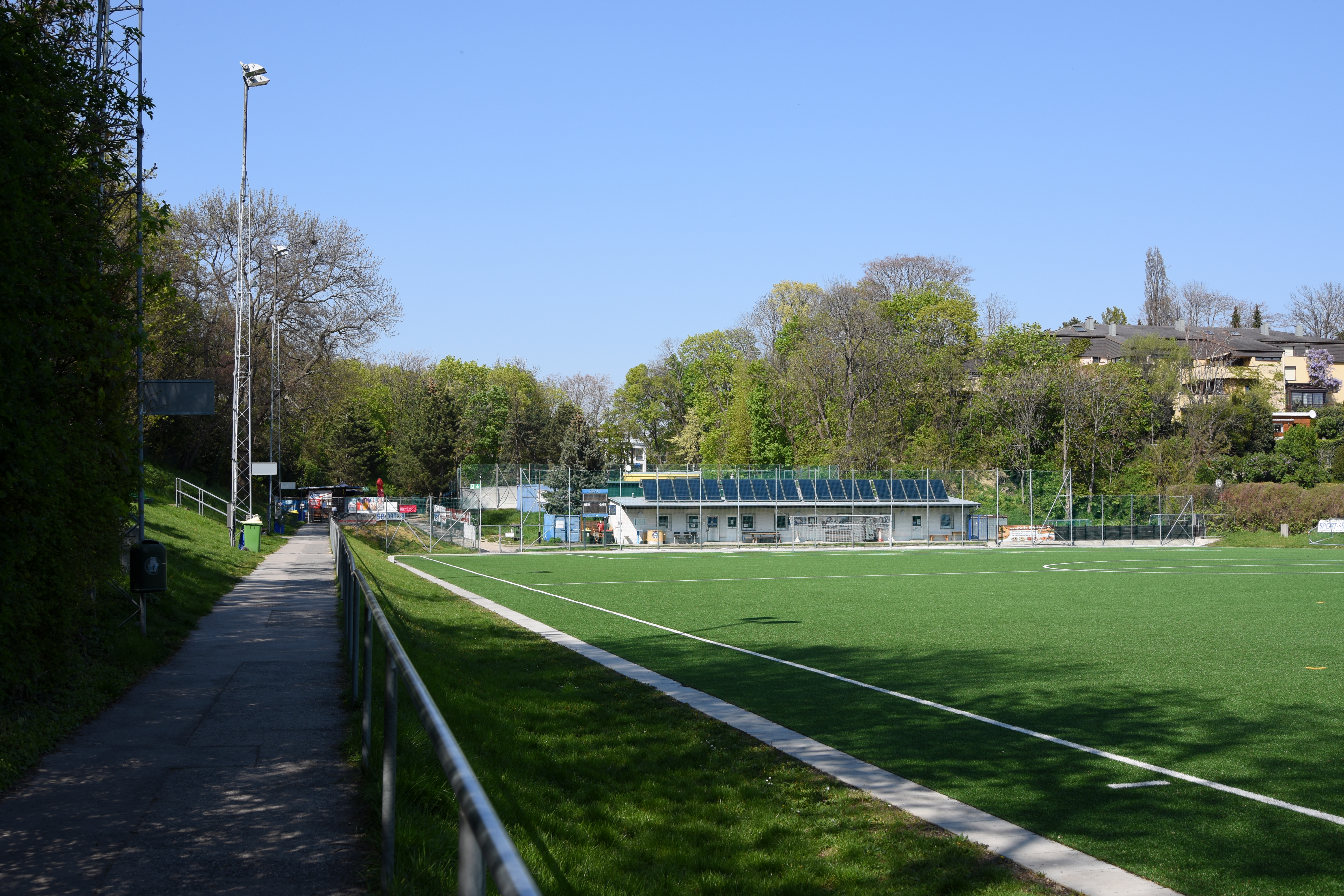 Sportplatz des NAC (Nussdorfer Athletic Club 1907) in Heiligenstadt